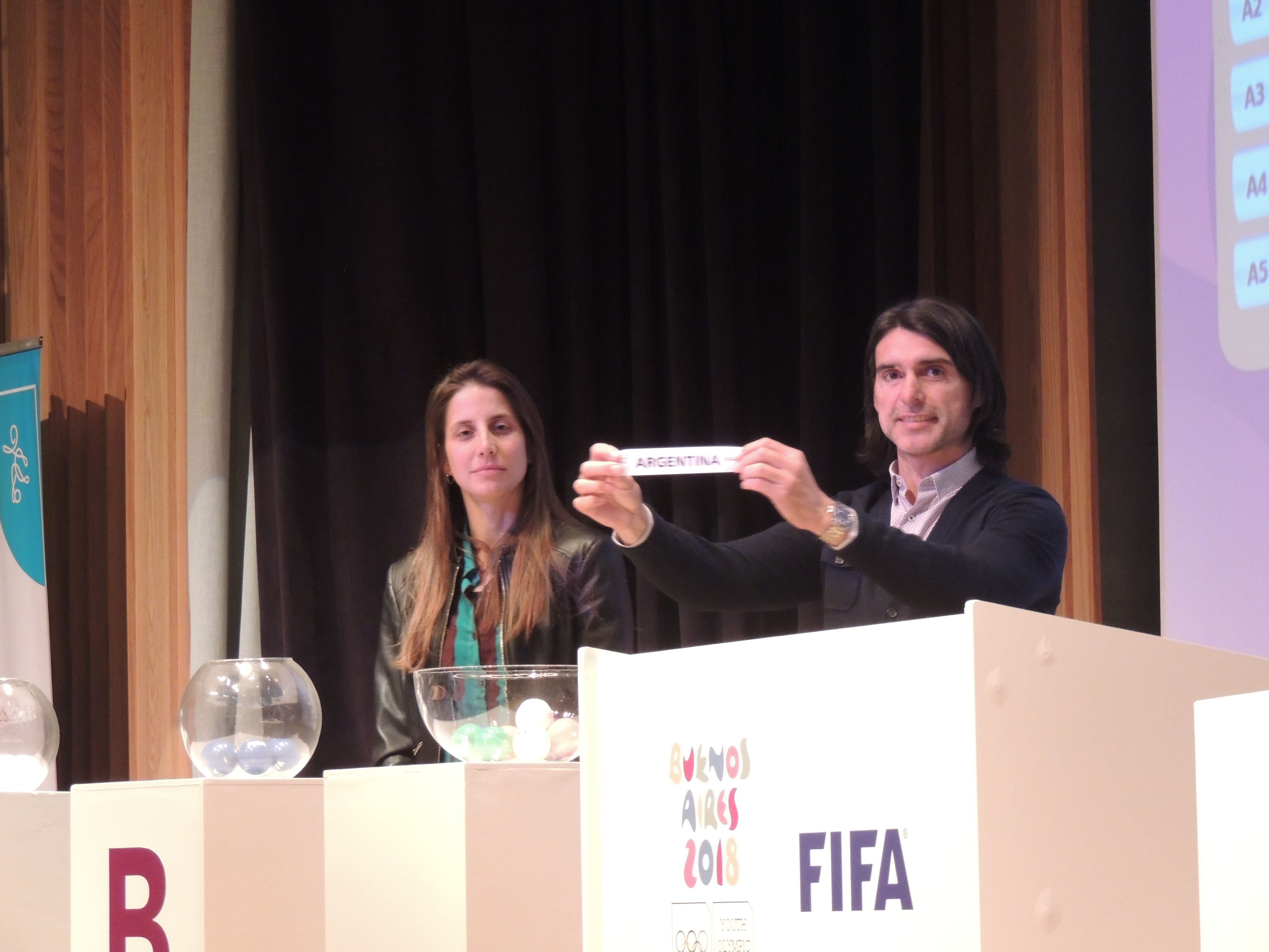 Ubicación de Argentina.